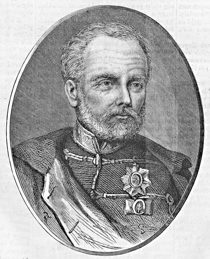 Bem József (Vasárnapi Ujság, 1869. január 17.)